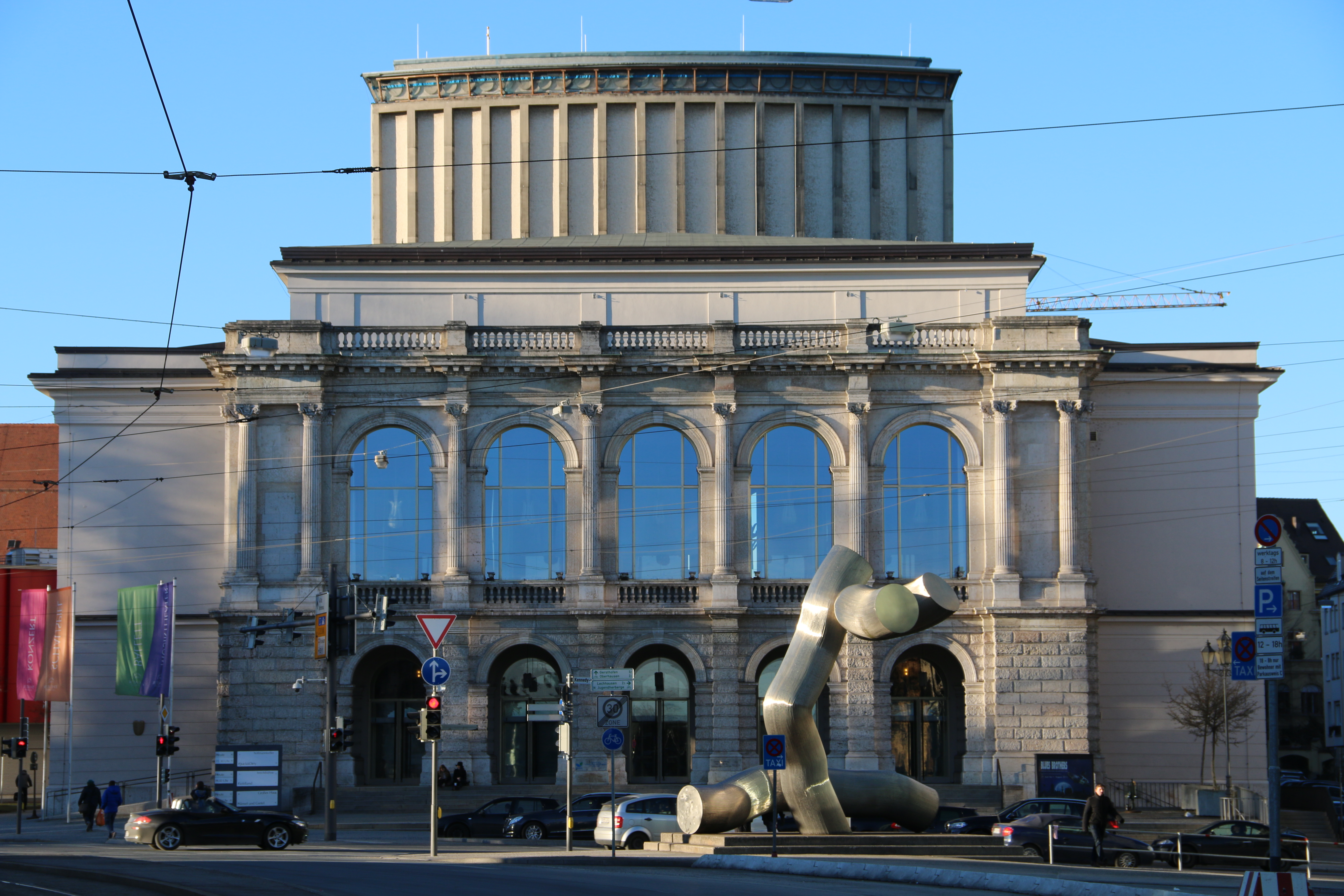 Großes Haus (Augsburg) The making of this document was supported by the Community-Budget of Wikimedia Germany.